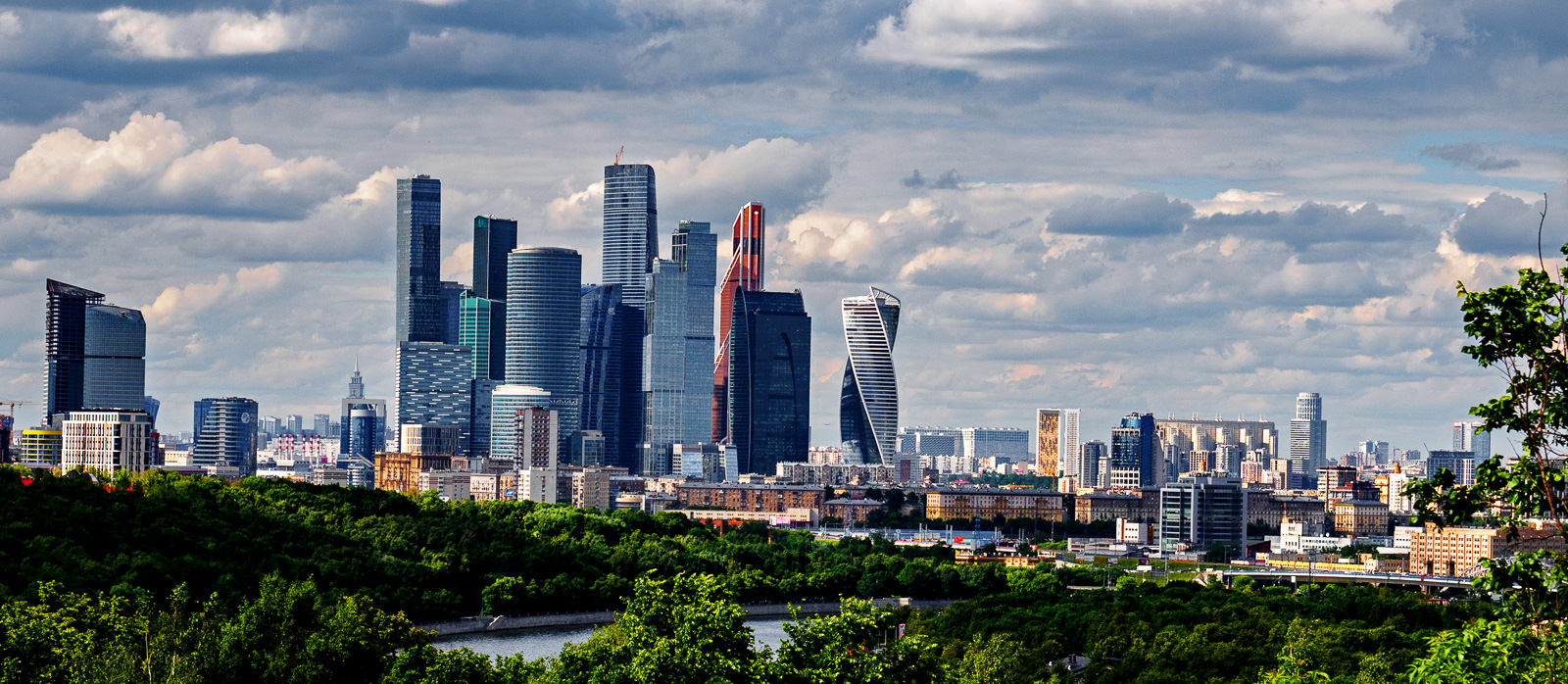 Moscow, Moscow International Business Center / Москва́, Московский международный деловой центр, 24/06/17